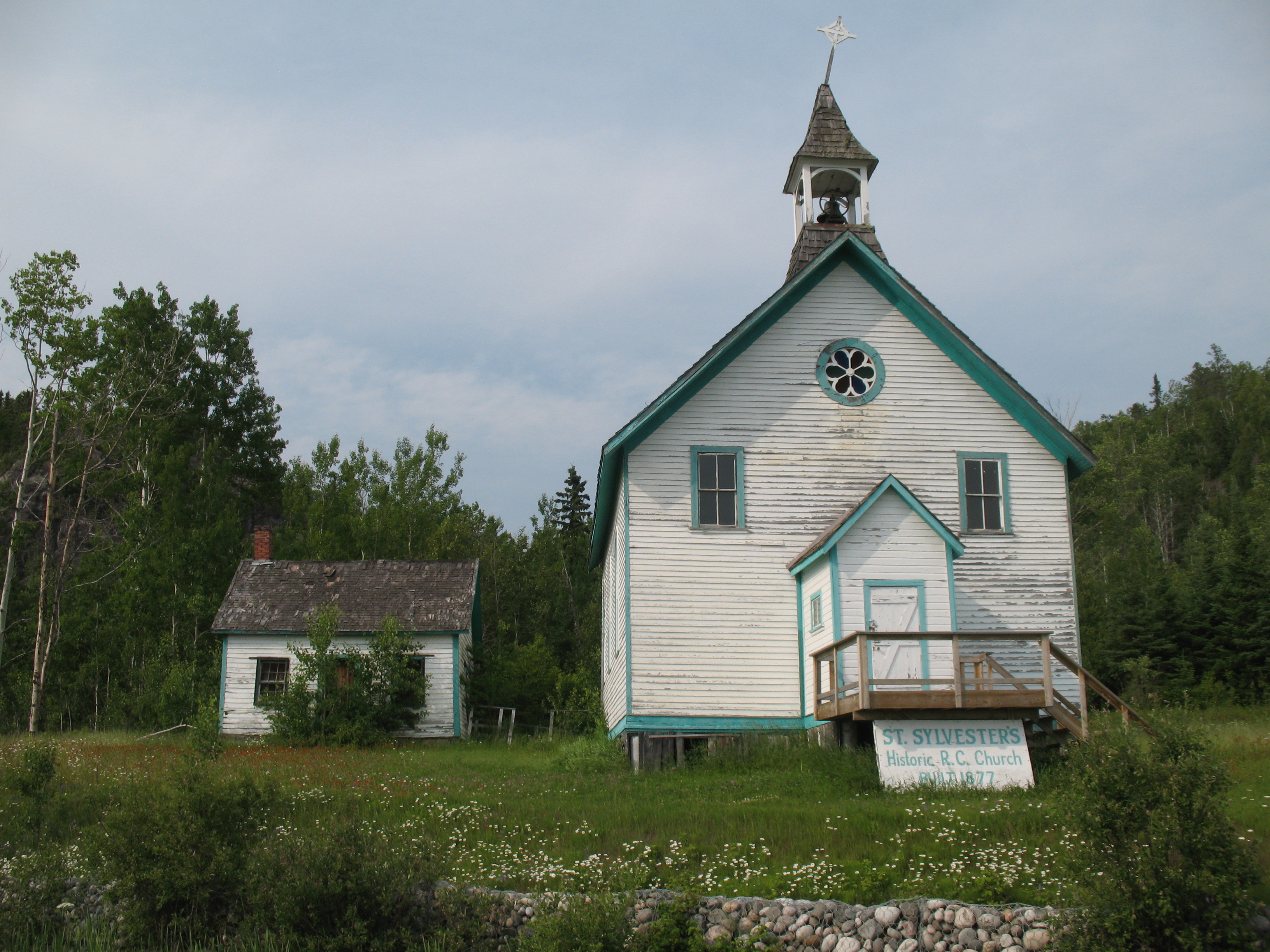 Die St. Sylvester's Mission Church am Lake Helen südlich des Lake Nipigon in Nord-Ontario, Kanada